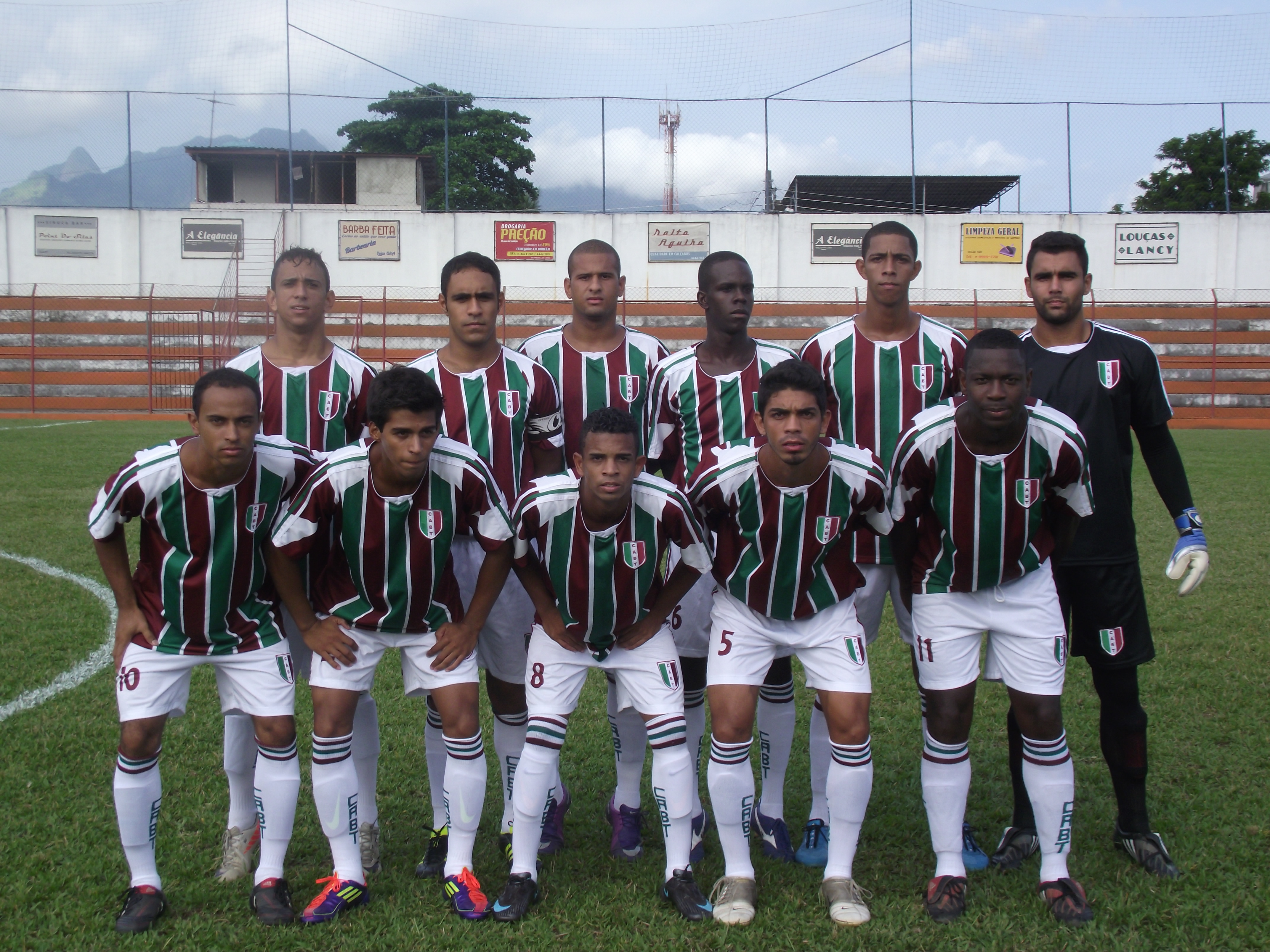 Time do Barra da Tijuca em 2012, o antigo Yasmin.